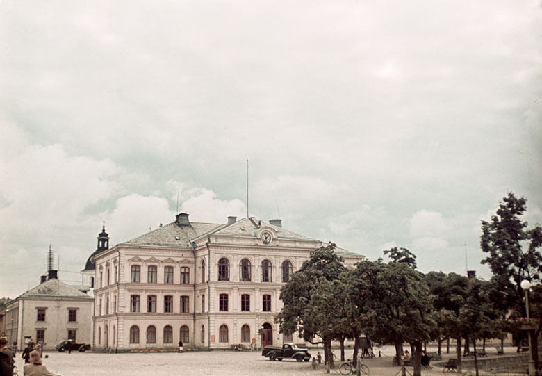 Stadshotellet Motiv: Filipstad Nyckelord: Riksintressen Kategori: Stadsmiljö, Hotell Stadshotellet.